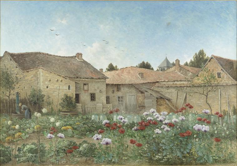 Paysage à Auménancourt - Champagne. Huile sur toile, salon de 1891, acquis par l'Etat, au Palais du Sénat